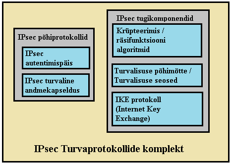 Joonisel IPsec turvalisusprotokollide komplekti osad